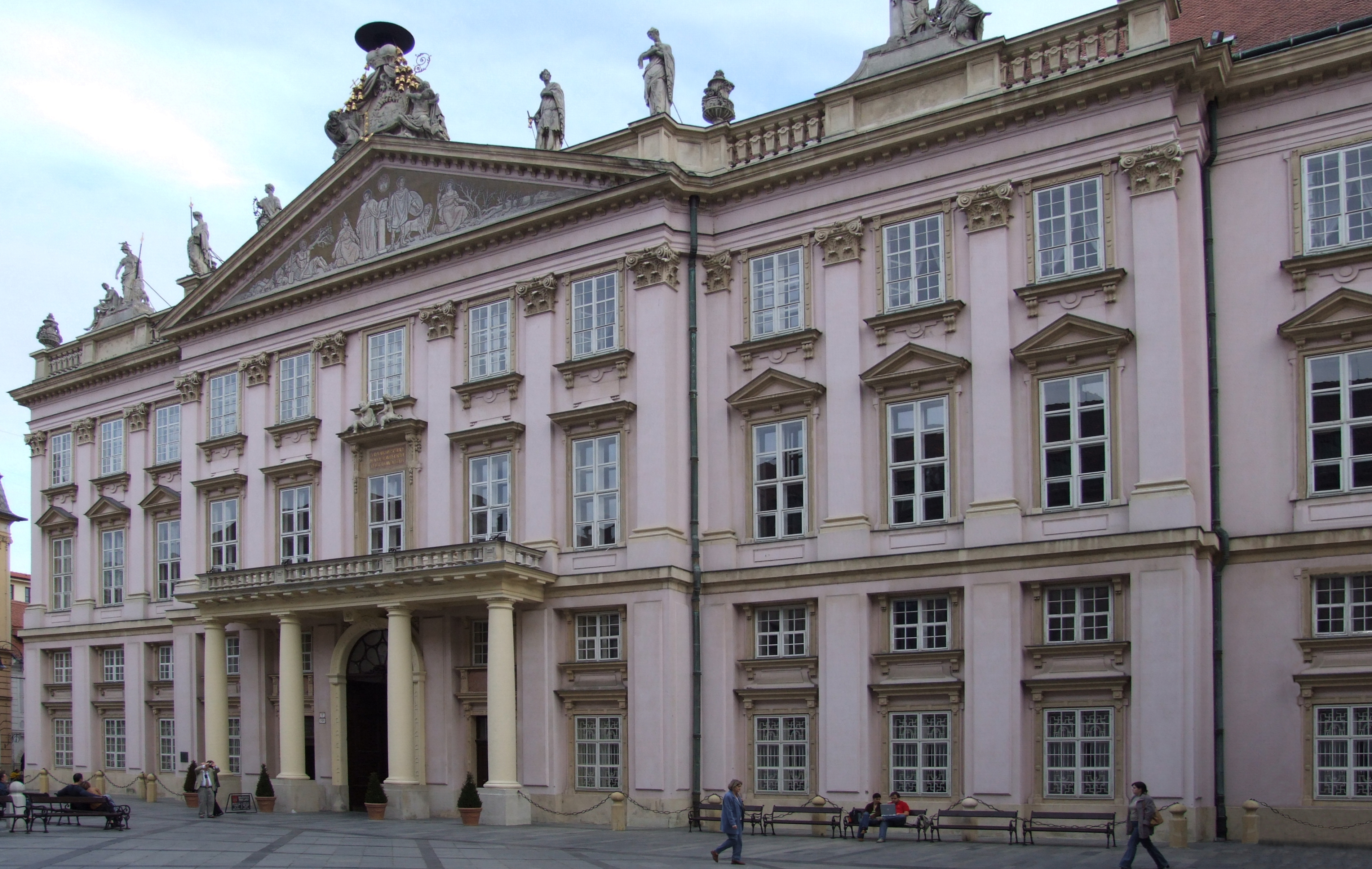 Primate's Palace, Bratislava, Slovakia